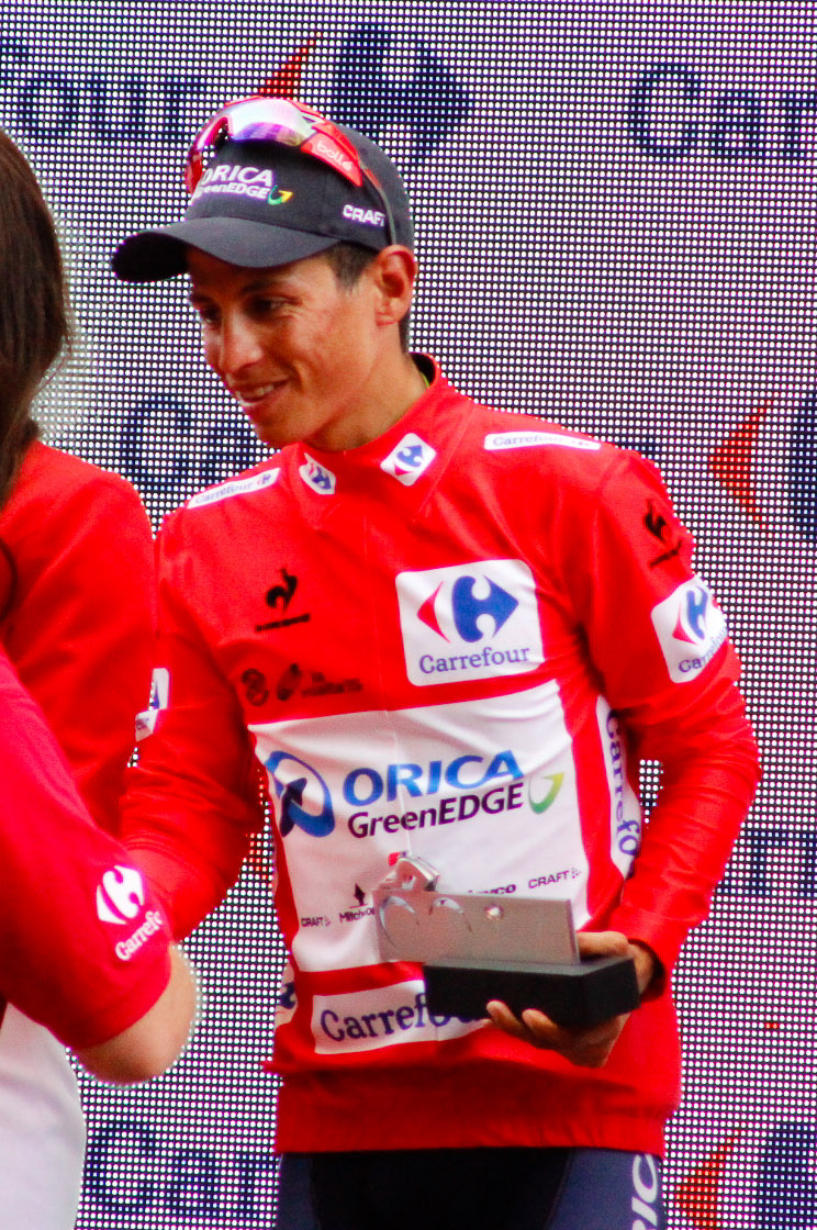 Vuelta a España 2015 | 8ª Etapa Puebla de Don Fadrique - Murcia-93